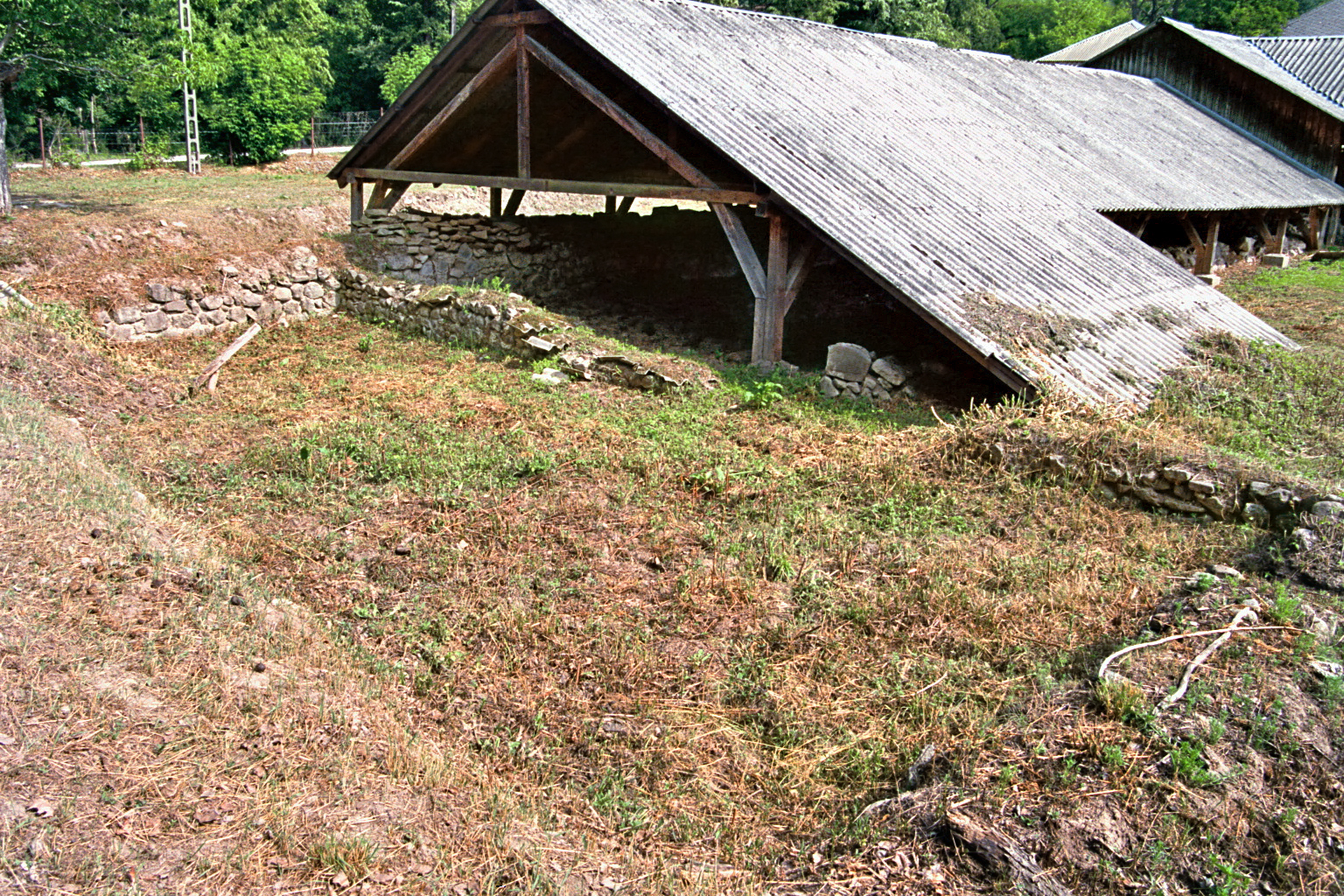 Kastell Visegrád–Gizellamajor (Ungarn): nordwestlicher Kastellbereich